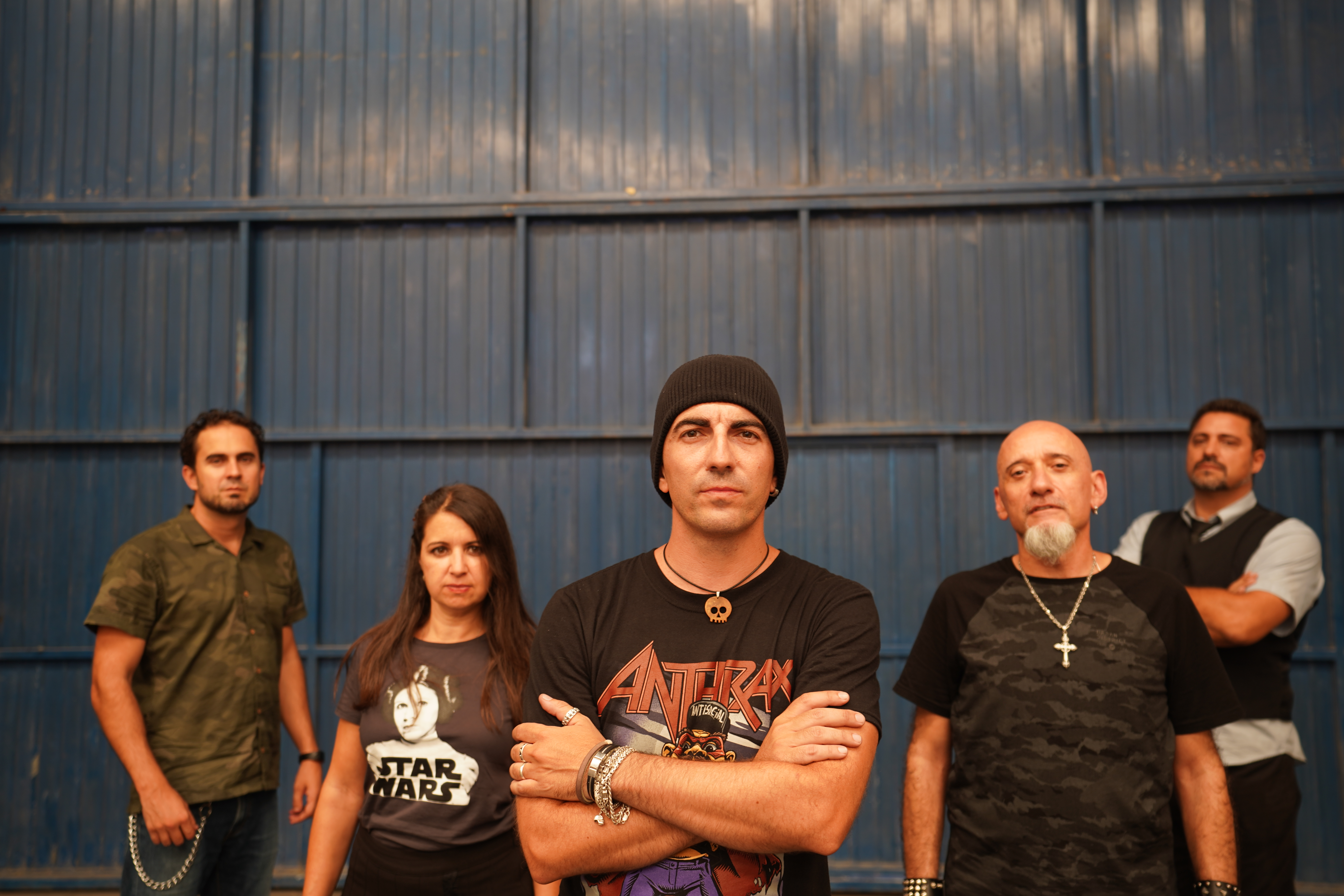 Foto de la banda. Septiembre 2019